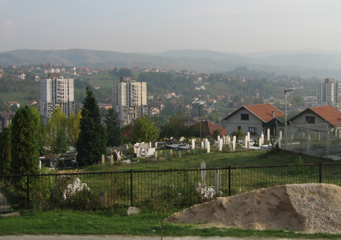 View of Kakanj from Varda